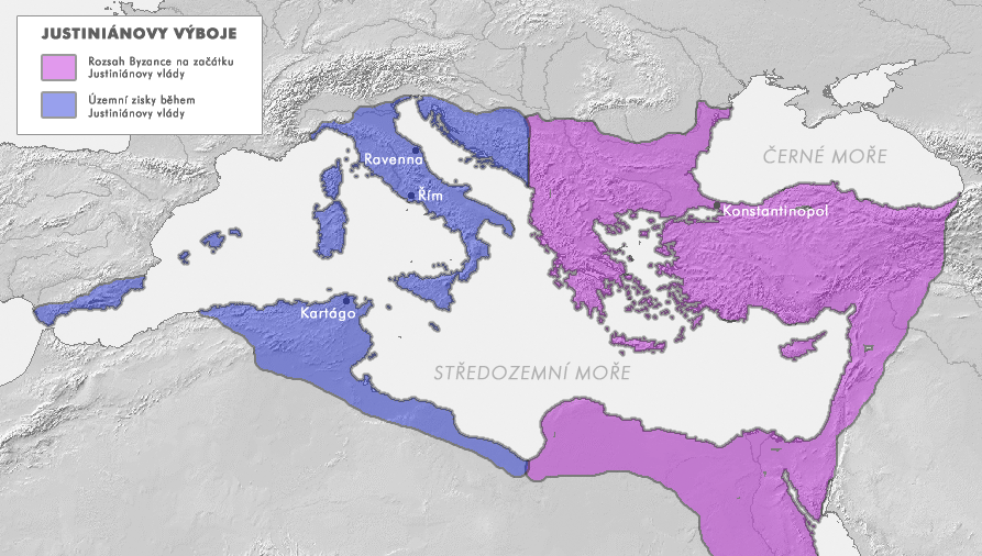 Rozsah Byzance za Justiniánovy vlády (kolem roku cs:550).